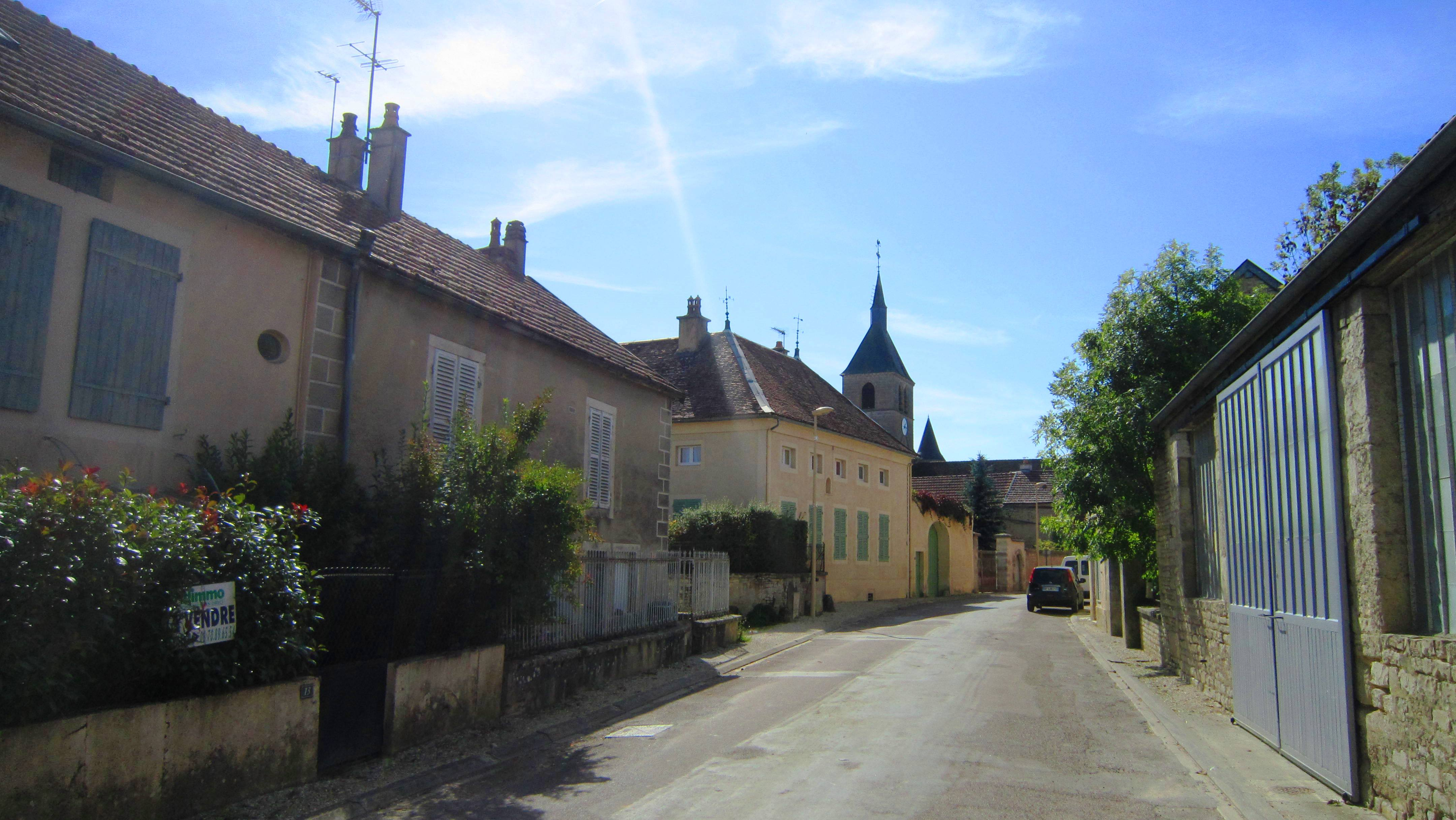 Nicey en Côte-d'Or (France]